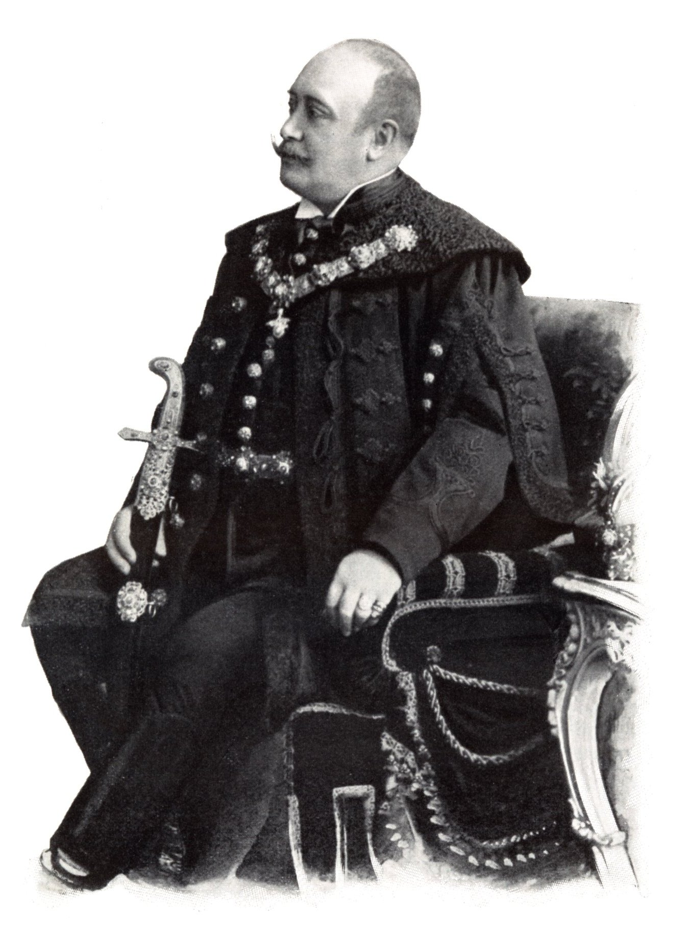 Kossuth Ferenc (1841-1914) politikus, Kossuth Lajos fia